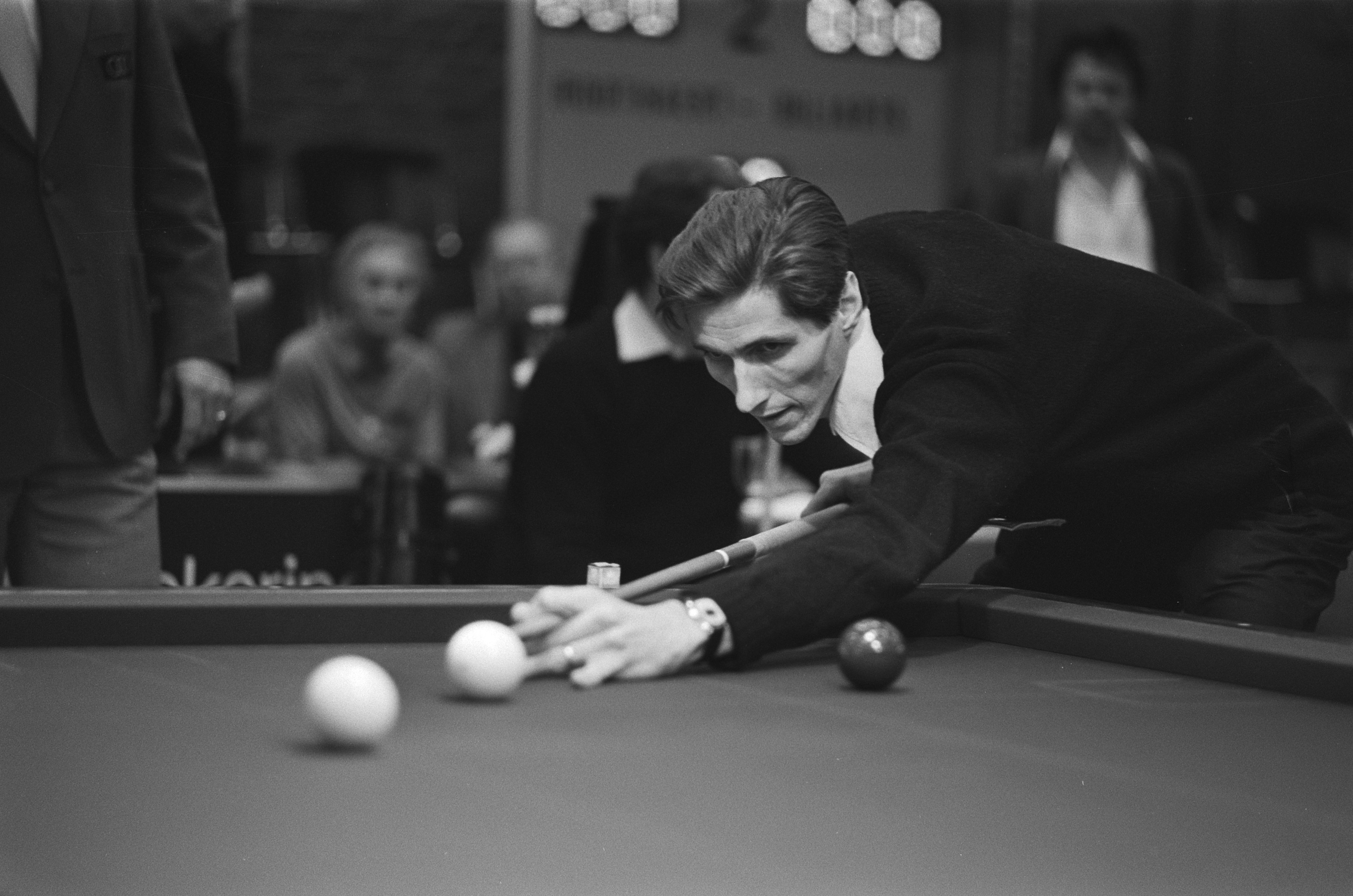 Collectie / Archief : Fotocollectie Anefo Reportage / Serie : [ onbekend ] Beschrijving : Europese kampioenschappen biljarten voor landenteam; Connesson in actie Datum : 4 november 1978 Trefwoorden : BILJARTEN, KAMPIOENSCHAPPEN Fotograaf : Bogaerts, Rob / Anefo Auteursrechthebbende : Nationaal Archief Materiaalsoort : Negatief (zwart/wit) Nummer archiefinventaris : bekijk toegang 2.24.01.05 Bestanddeelnummer : 929-9783